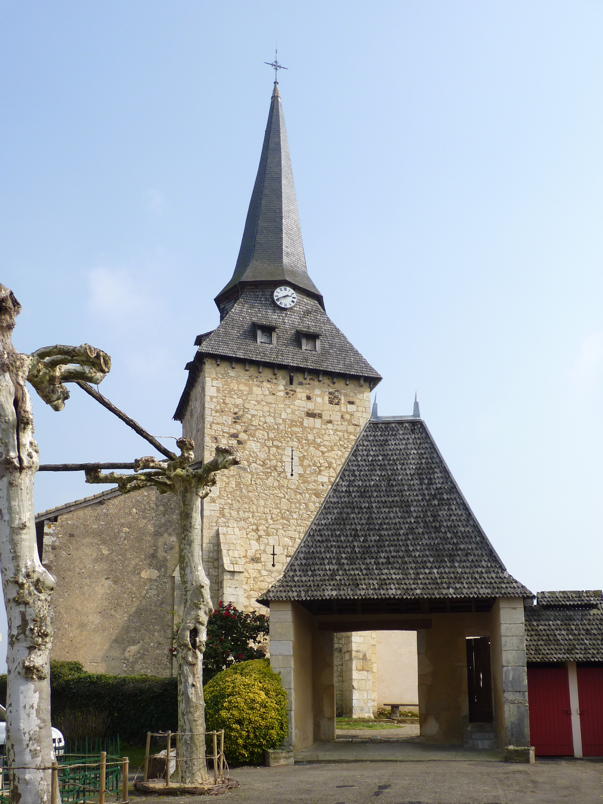 Eglise Saint-Jean-Baptiste de Larbey